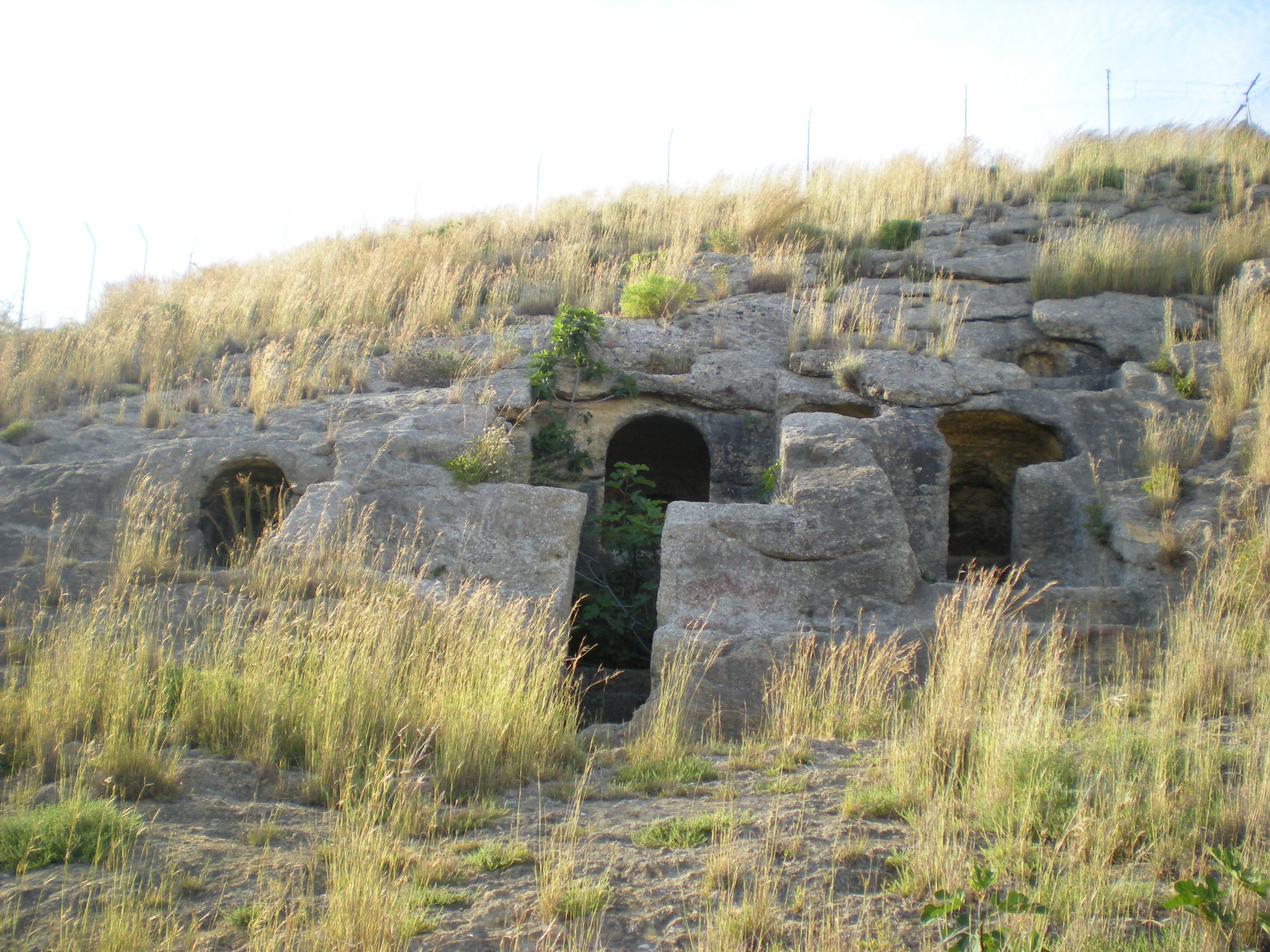 Vista de los columbarios de Carissa Aurelia, yacimiento hispanorromano en Espera (Cádiz).